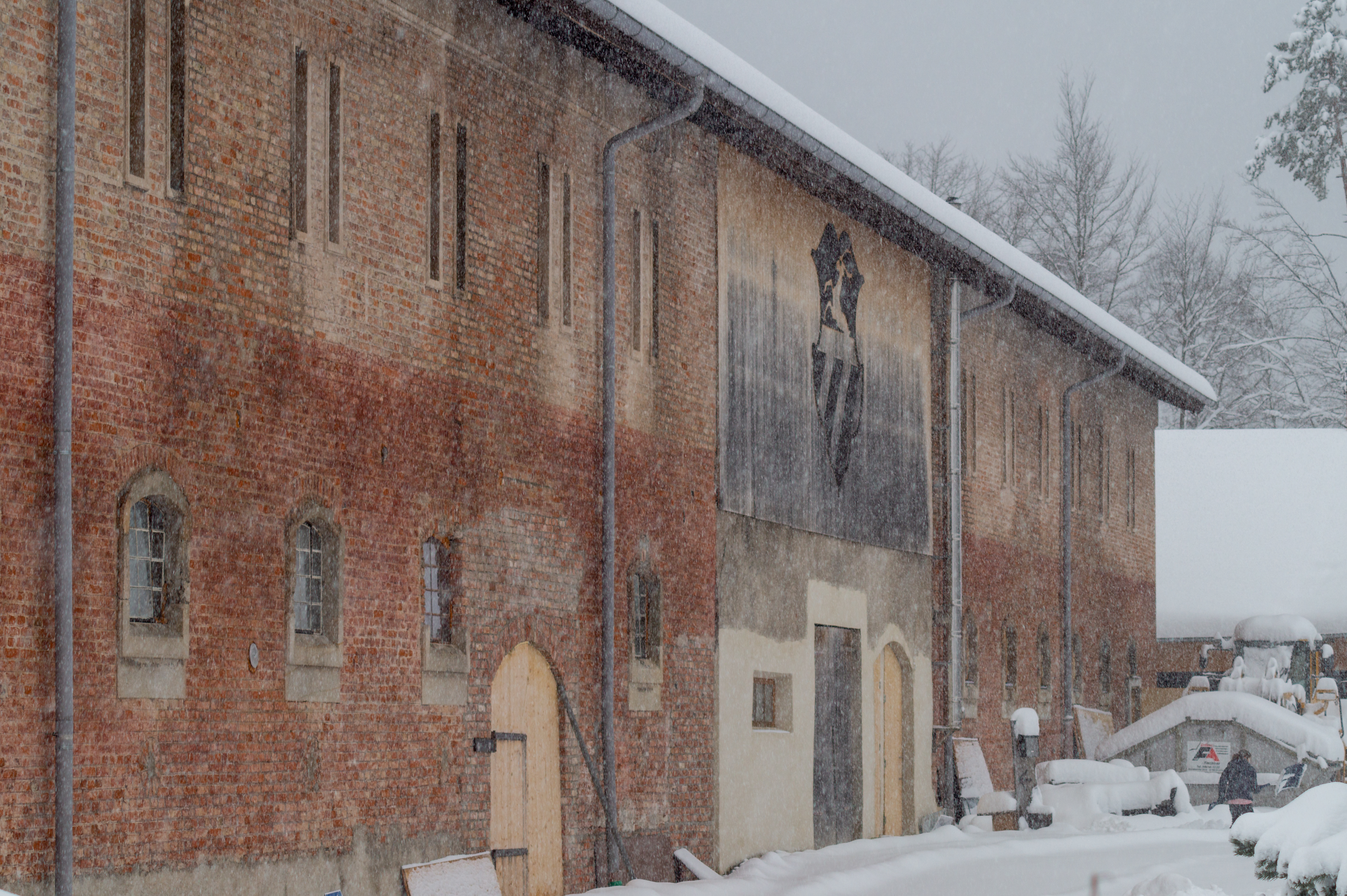 Nordseite des Gutsgebäudes von Gut Staltach